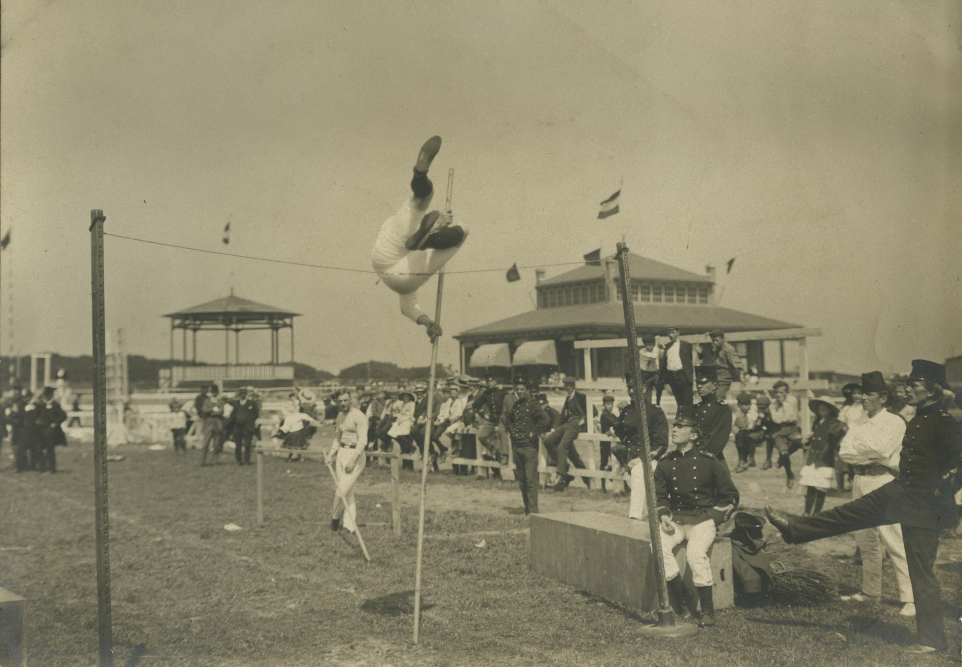 Polsstokhoogspringen tijdens de Tweede Nationale Sportdagen van de Nederlandse Bond voor Lichamelijke Opvoeding van 26 september tot en met 4 oktober 1909 in Park Zorgvliet, Den Haag.